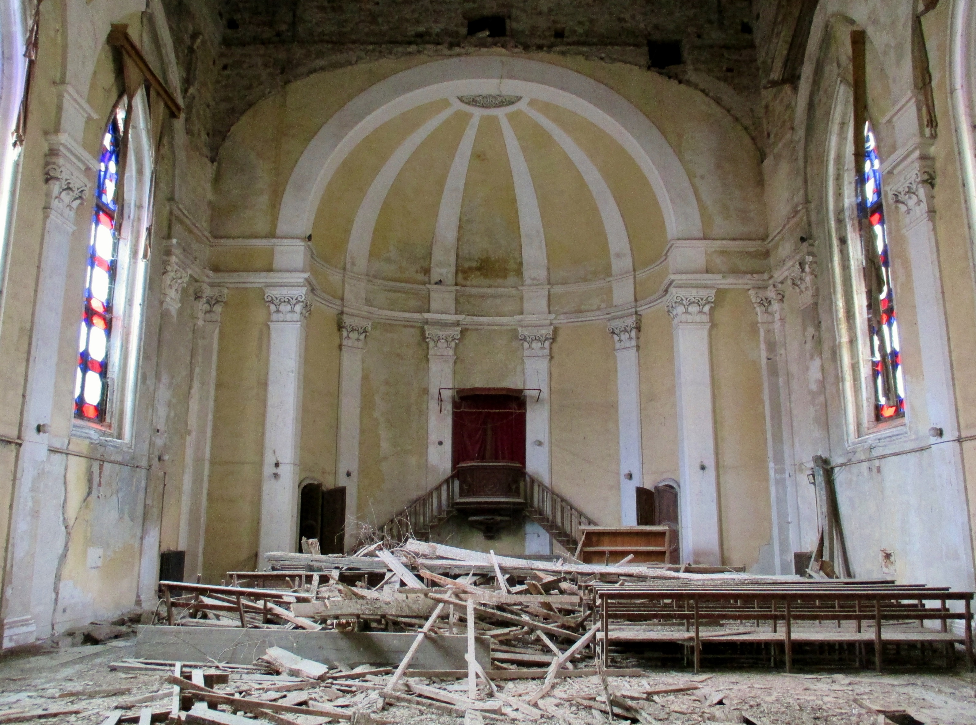 Livorno, interno della chiesa olandese-alemanna, in rovina.